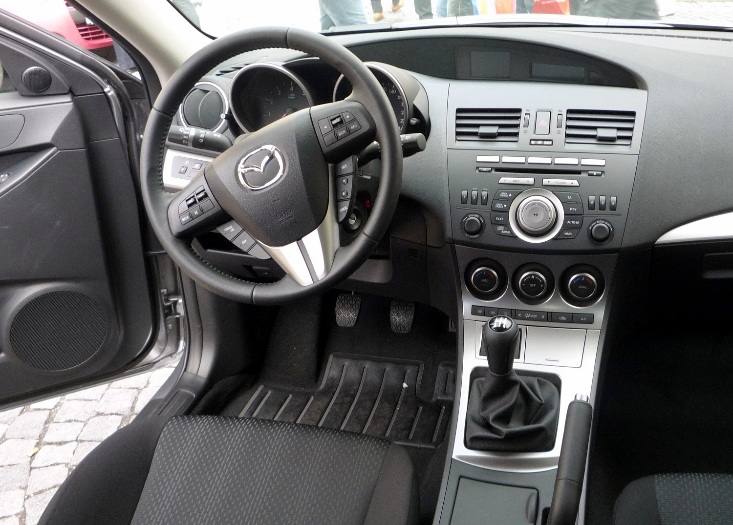 Mazda 3 BL Sport